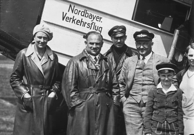 Der bekannte Ozeanflieger Hauptmann Köhl bei der Nordbayerischen Verkehrs-Flug-Gesellschaft! Unser Bild zeigt den bekannten Ozeanflieger Haptmann Köhl (mitte) mit seiner Gattin (links) und Direktor Croneiss von der Nordbayerischen Verkehrsfluggesellschaft, dessen Leitung der bekannte Ozeanflieger übernommen hat. - Ergänzung laut Barbara Ohm u.a.: "Fliegen, nur Fliegen", Bamberg 2003, ISBN 3-924983-14-3, S. 56: von links Frau Köhl, Hermann Köhl, Flugkapitän van Vloten, Theo Croneiß, Sohn Gernot Croneiß, Frau Croneiß. Am Flughafen Fürth-Atzenhof vor einer Messerschmitt M 24. Bildausschnitt, vgl. Foto auf fuerthwiki.de